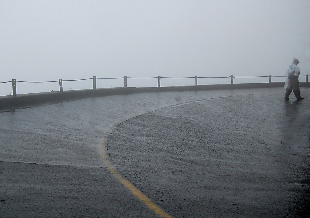 Estrada Caminho do Mar